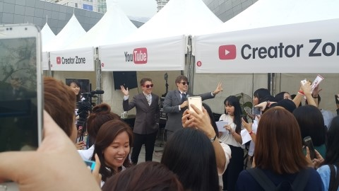 2015년 YouTube FanFest Korea에서 팬과 사진촬영중인 영국남자